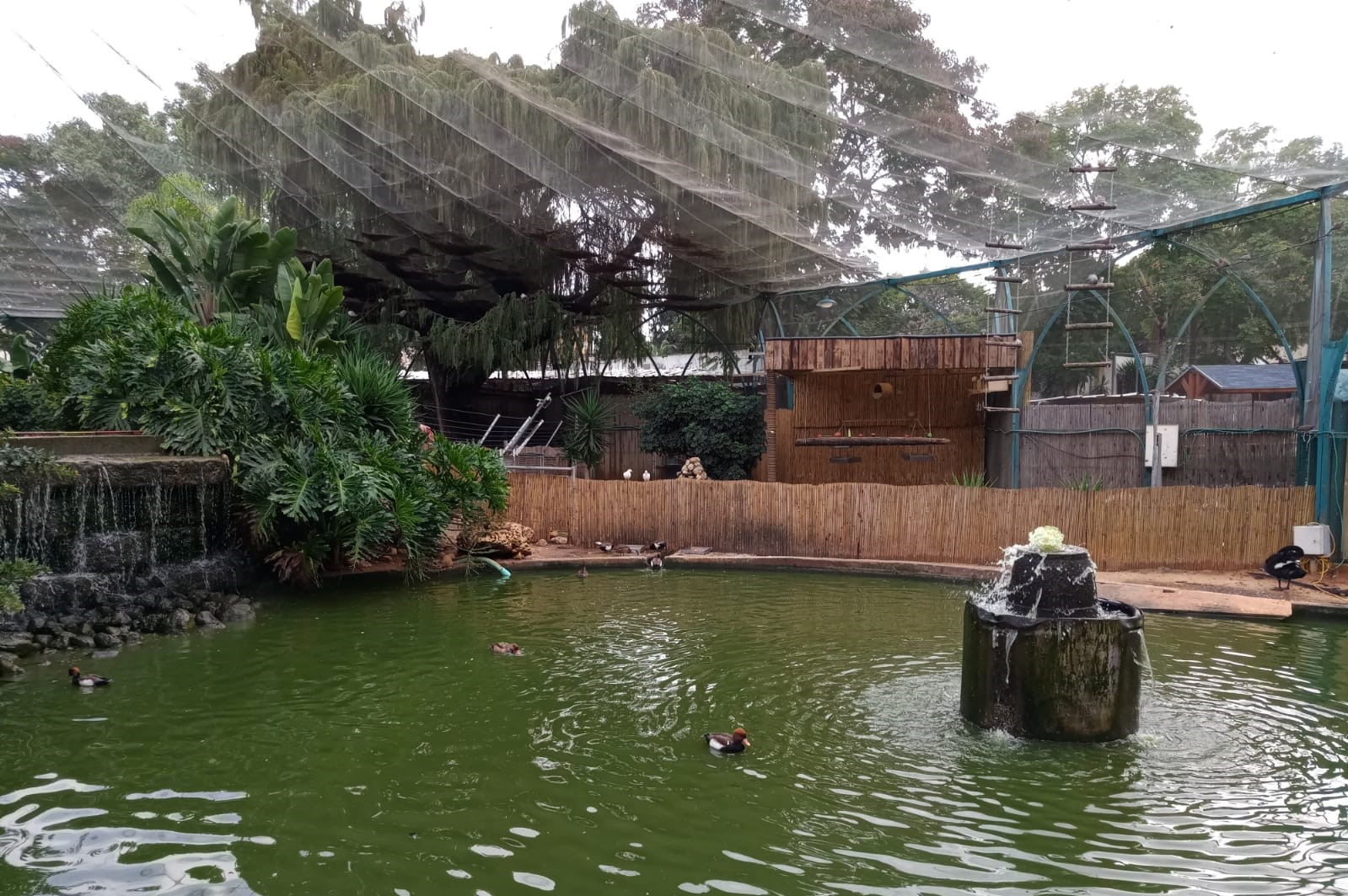 גן החי בפתח תקווה